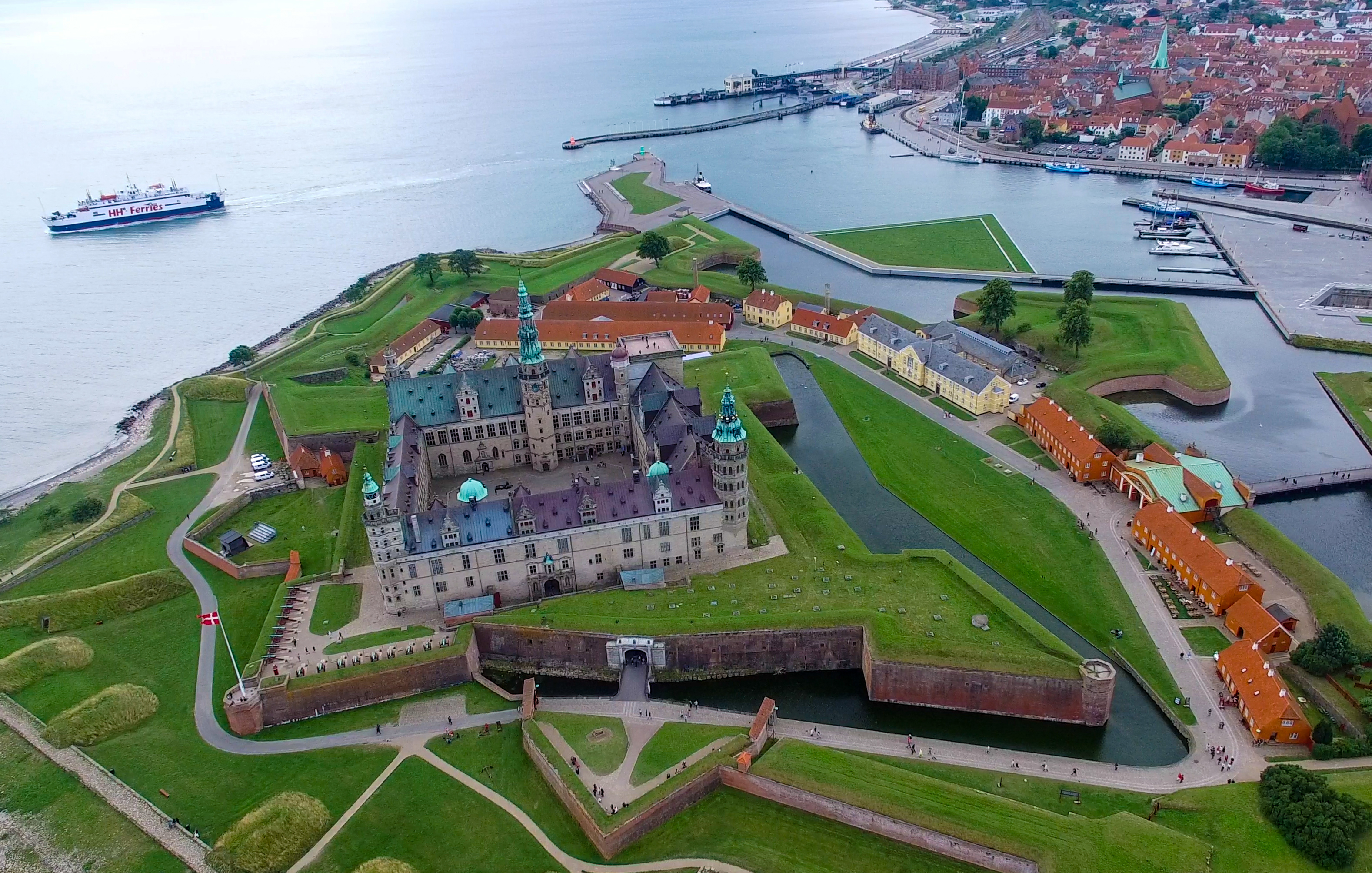 Kronborg-Drone-001-14